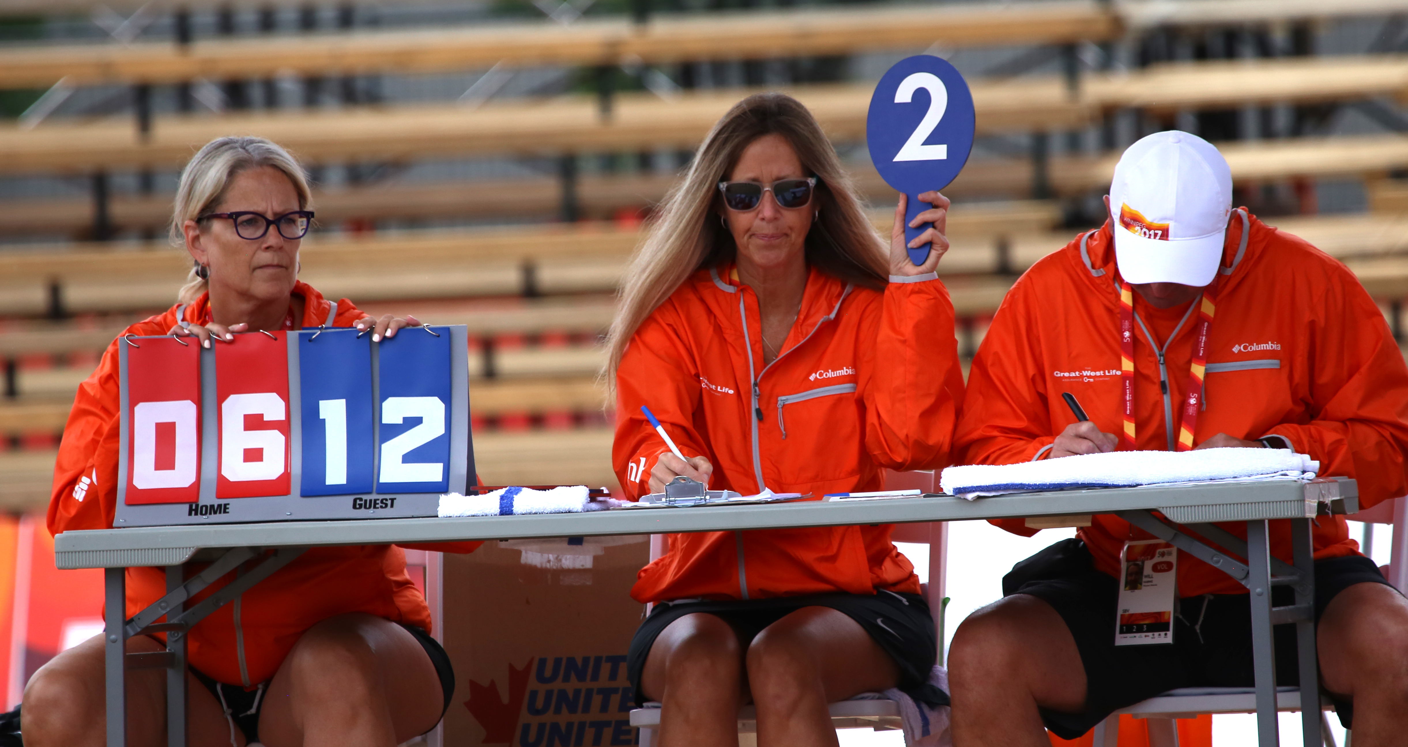 2017-08-04-Paul_Reimer-Beach Volleyball Medals-022